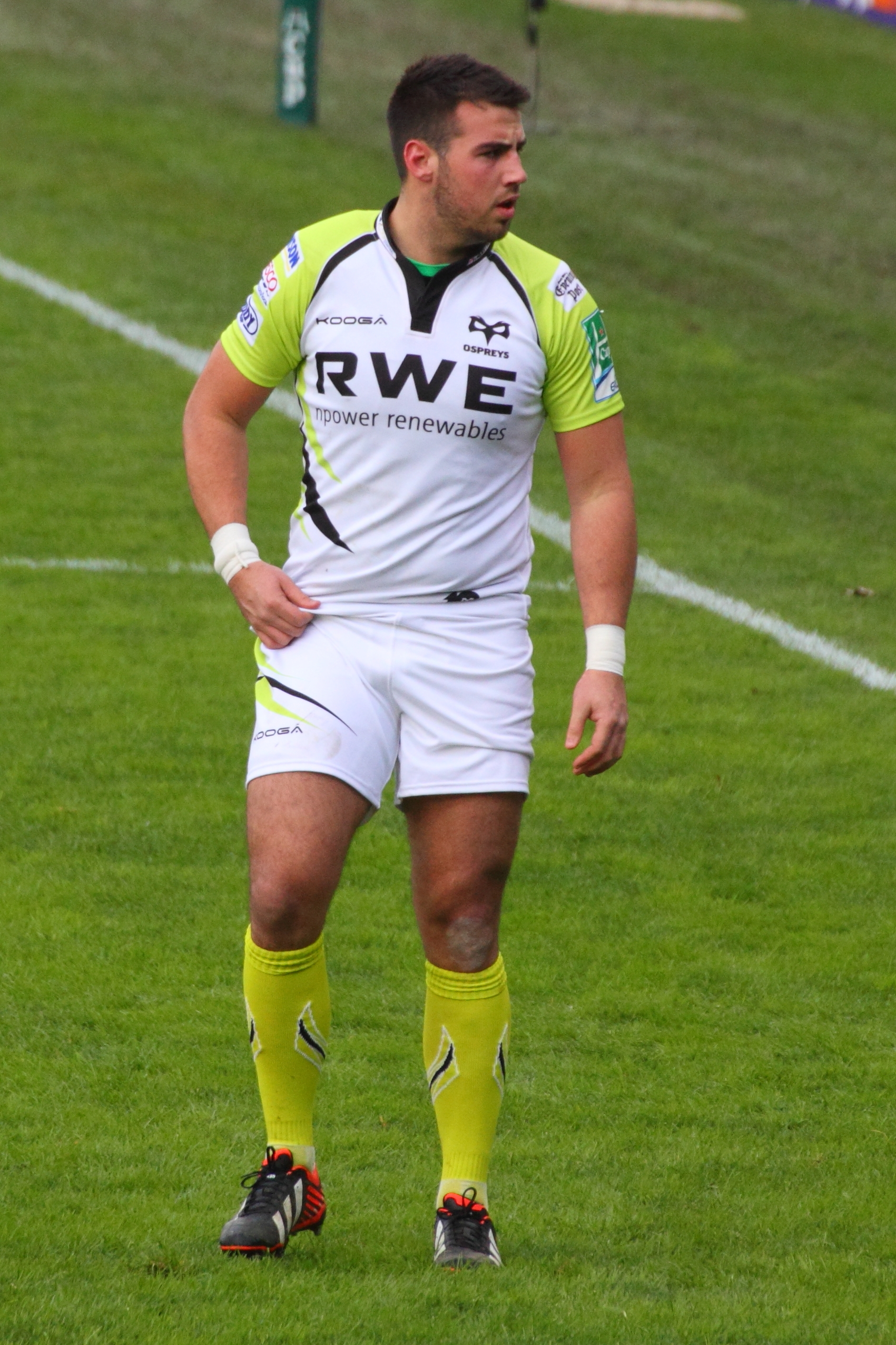 Heineken Cup 2012-2013 — 8 décembre 2012, Stade Ernest Wallon. Match between: Stade toulousain — Ospreys